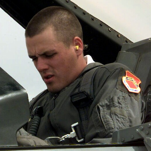 see original